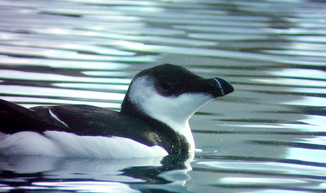 Lieu : Cotentin (Normandie/France) Petit pingouin (Razorbill) : Alca torda